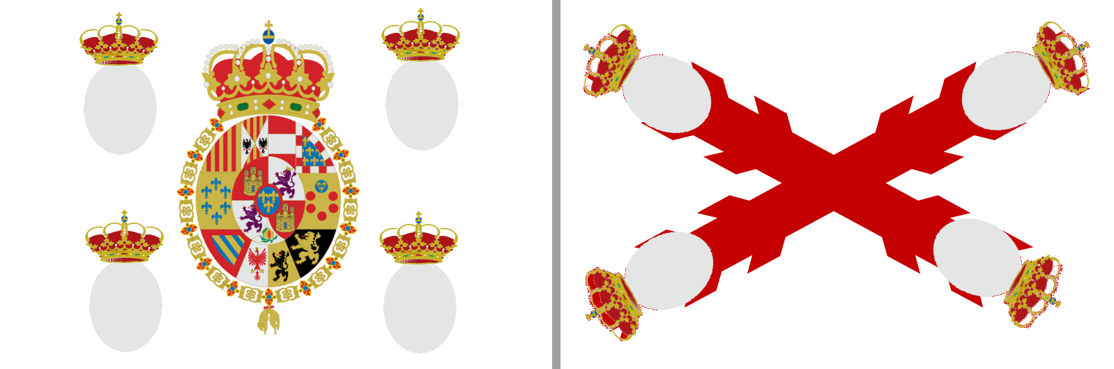 Spain Regiments Flags 1808-1826